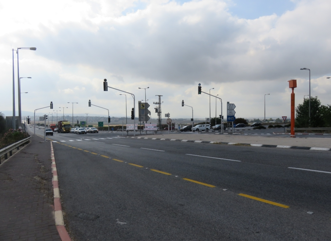 צומת השומרים